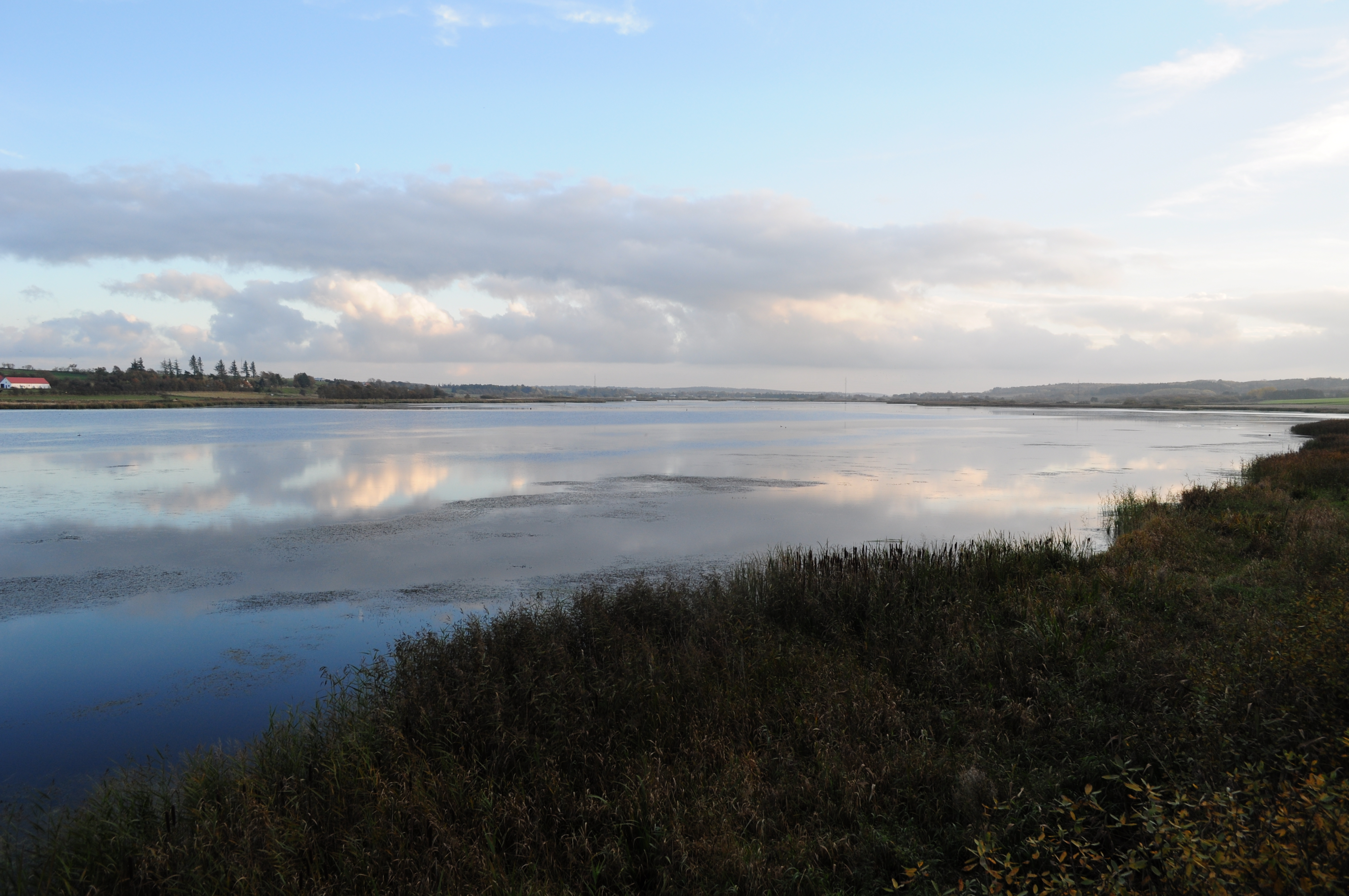 Halkær sø set mod sydøst